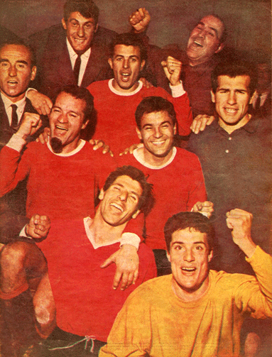 El equipo de Independiente festeja en el vestuario el primer partido de la Copa Intercontinental 1964 vs Internazionale, con victoria por 1-0 para los rojos.